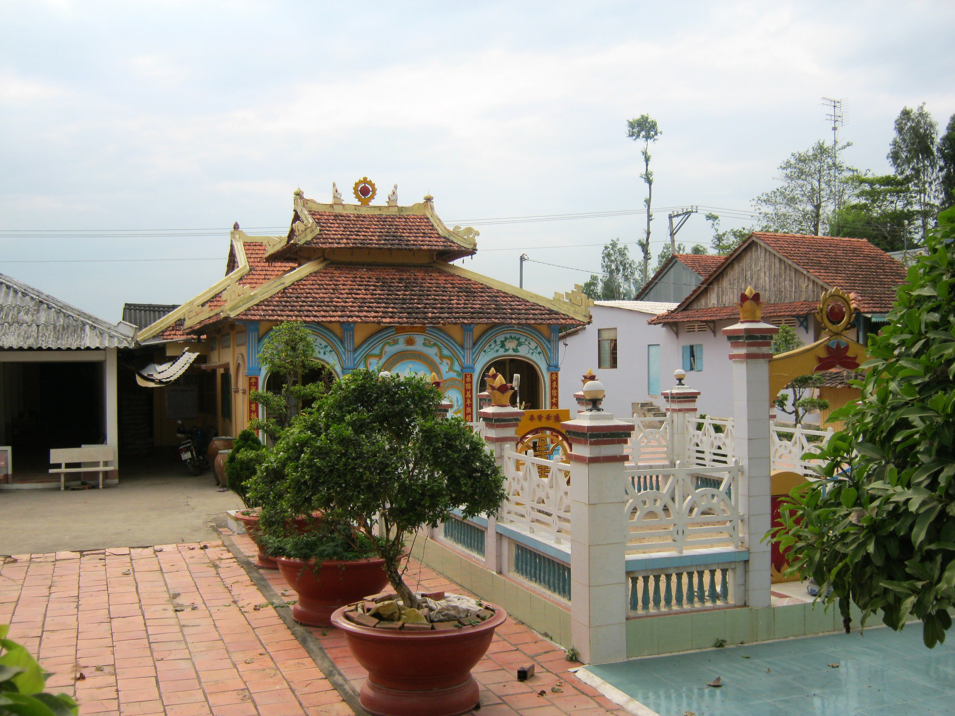 Khu đền mộ Phật Mẫu (mẹ Phật Thầy Tây An) ở Cái Nai, thuộc xã Hội An, huyện Chợ Mới, tỉnh An Giang. Mộ ở phía trước đền, không đấp núm, không mộ bia. Đền thờ xây theo kiểu đình Nam Bộ với dạng chữ “tam”. Bên trong chính điện có treo một tấm trần điều đề hai chữ Việt: Phật Mẫu.